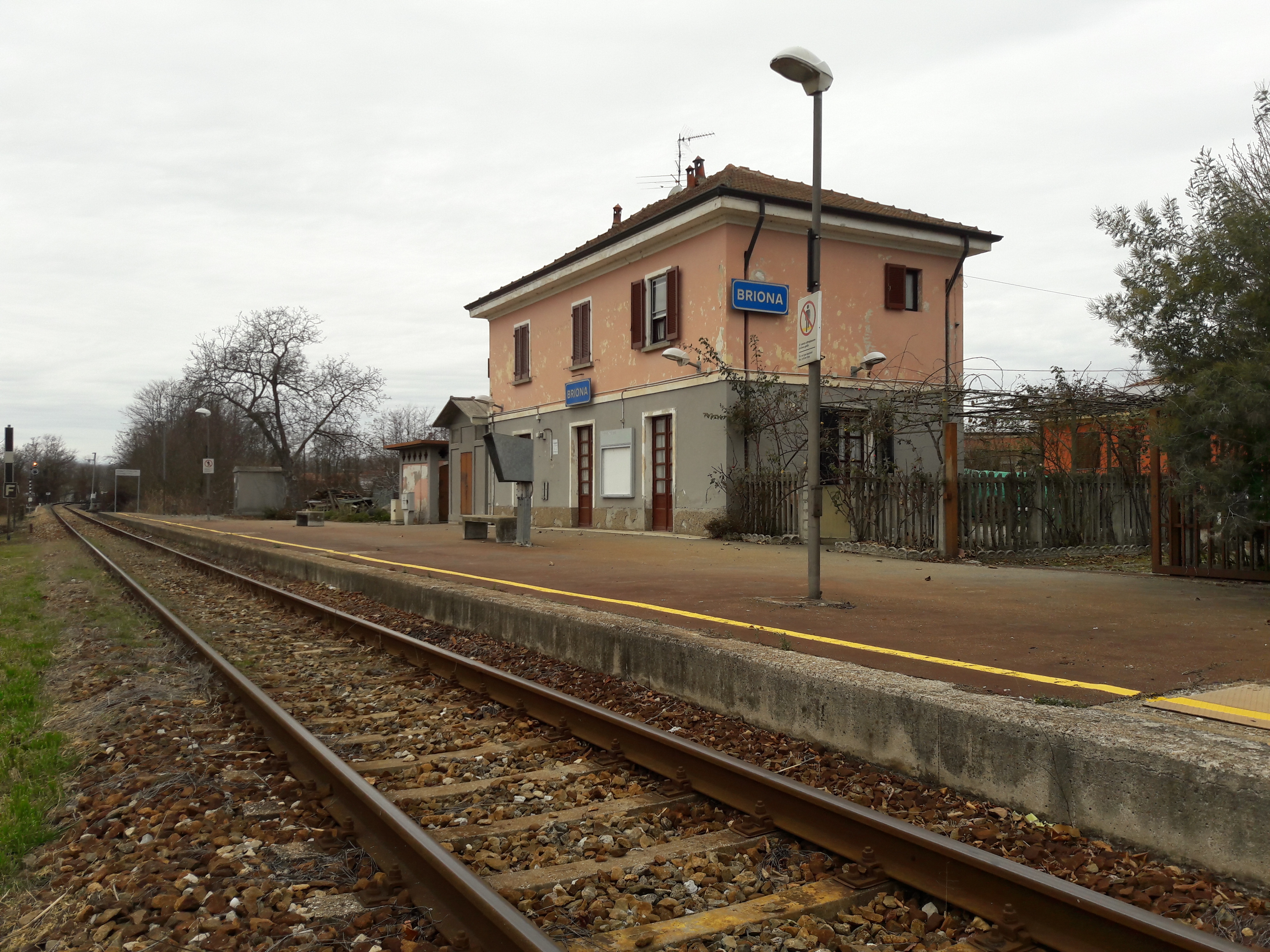 Fermata lato binari, in direzione Varallo.